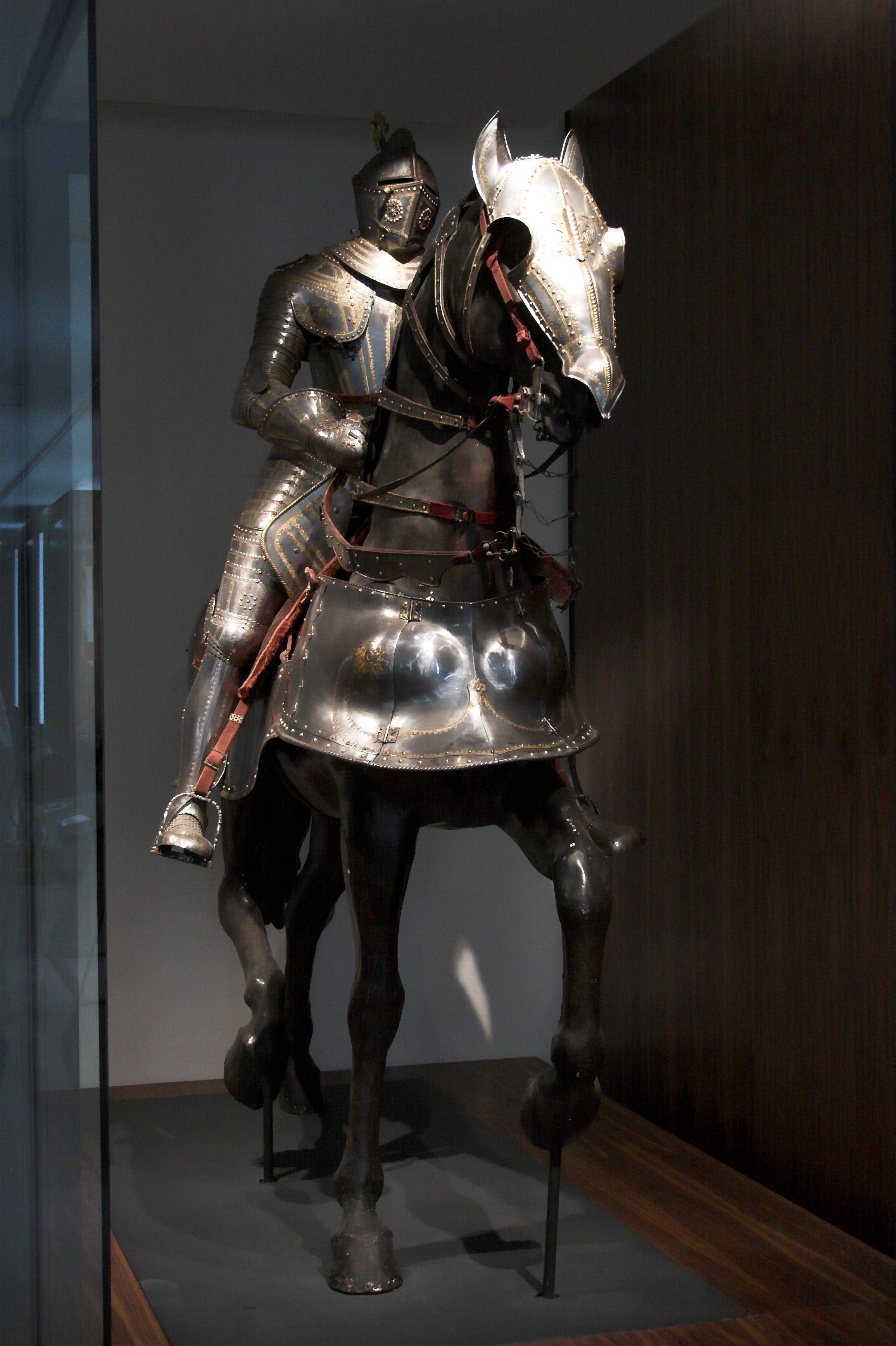 Armor related to Louis XIII (Musée de l'armée, Paris, France)